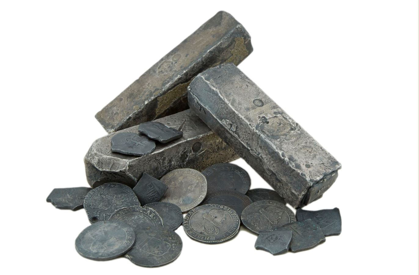 Trésor du Slot Ter Hooge, XVIIème siècles (collections historiques de la Monnaie de Paris)